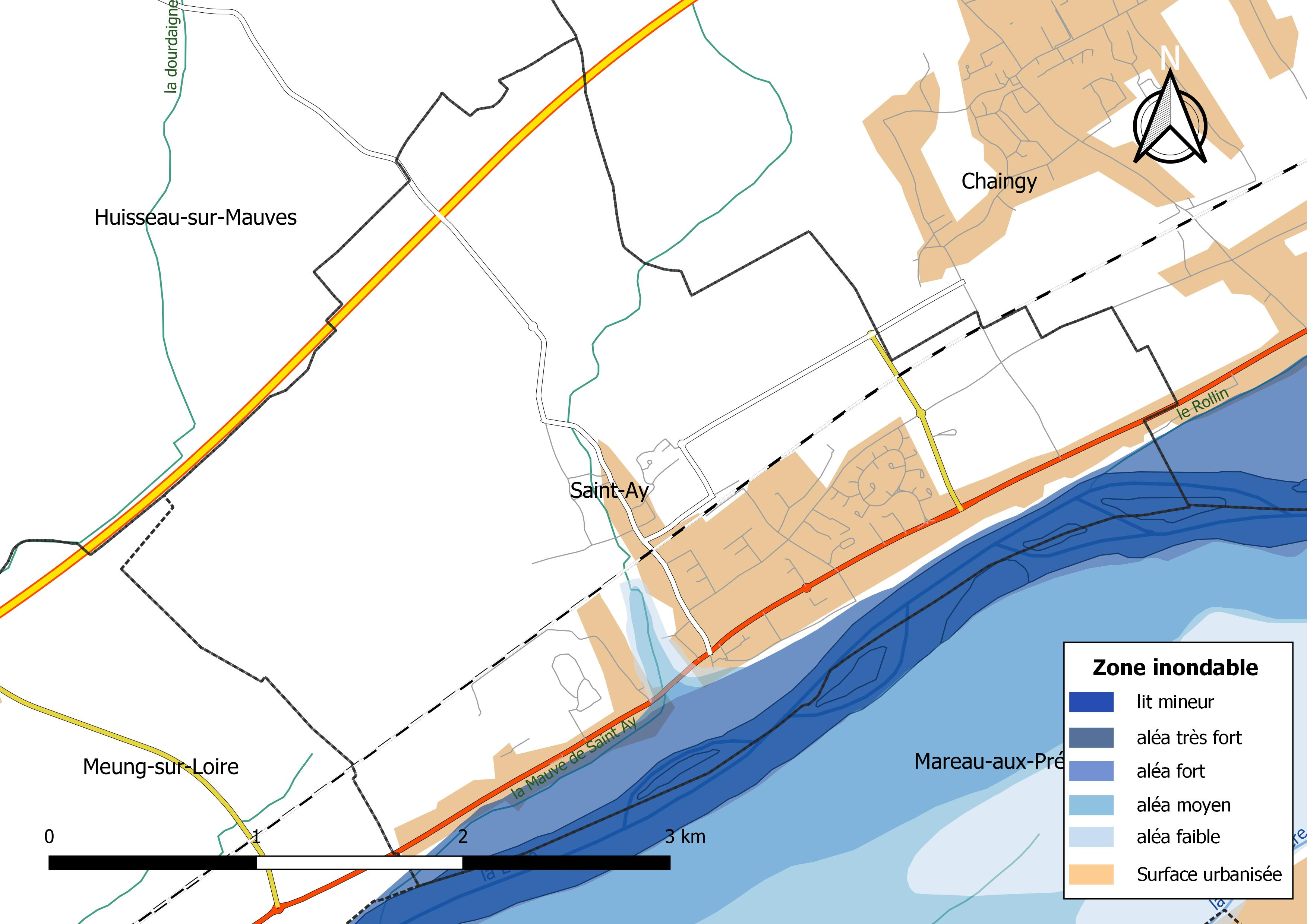 Zone inondable et réseaux hydrographique et routier de la commune de Saint-Ay (Loiret, France).